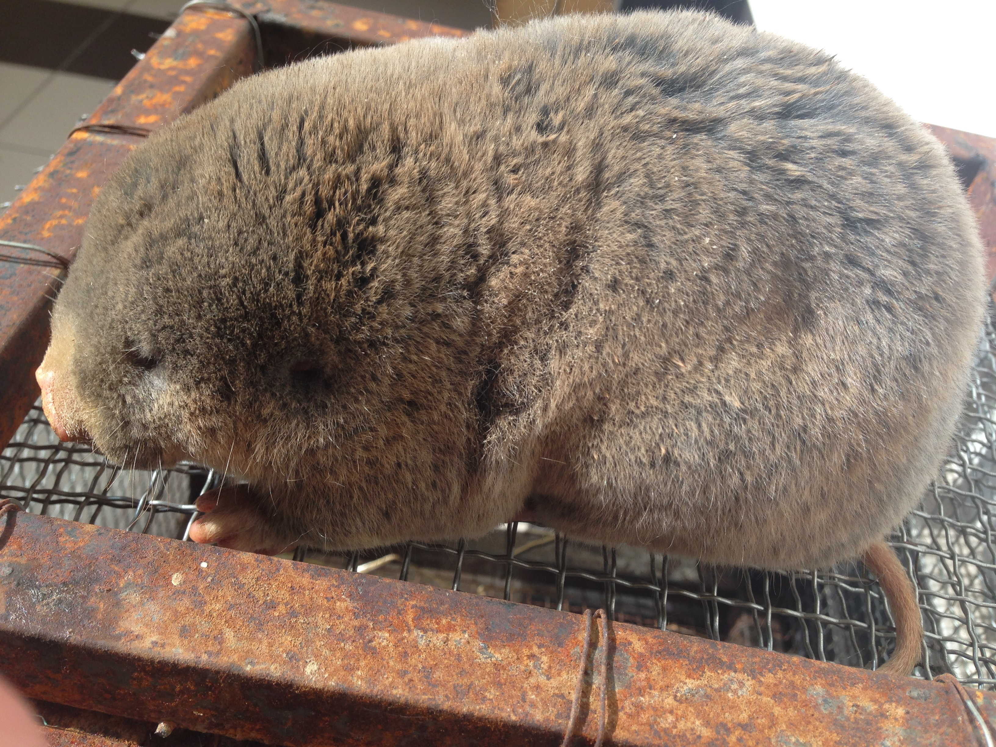 高原鼢鼠 侧面